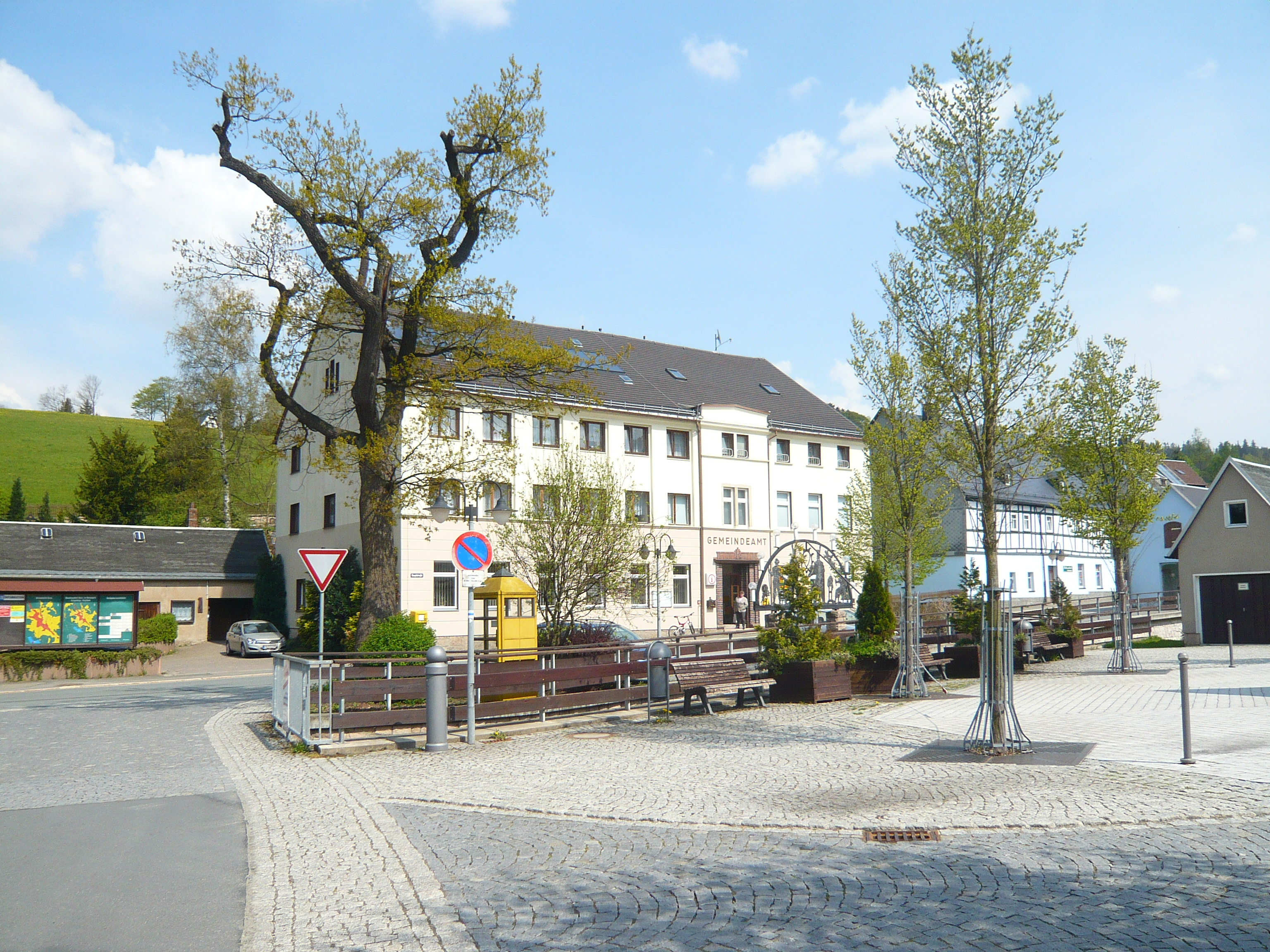 Sosa (Eibenstock)